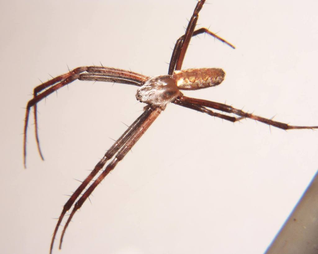 Argiope aurantia male specimen